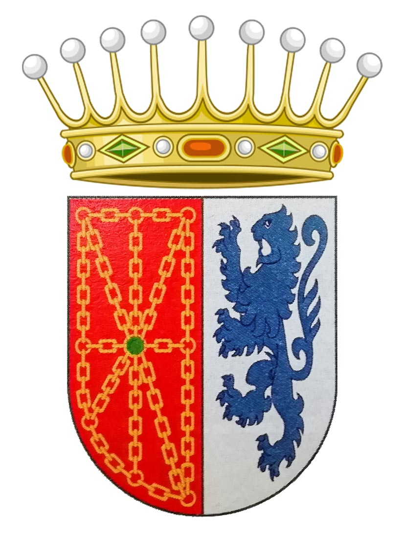 Escudo de armas del Condado de Ablitas